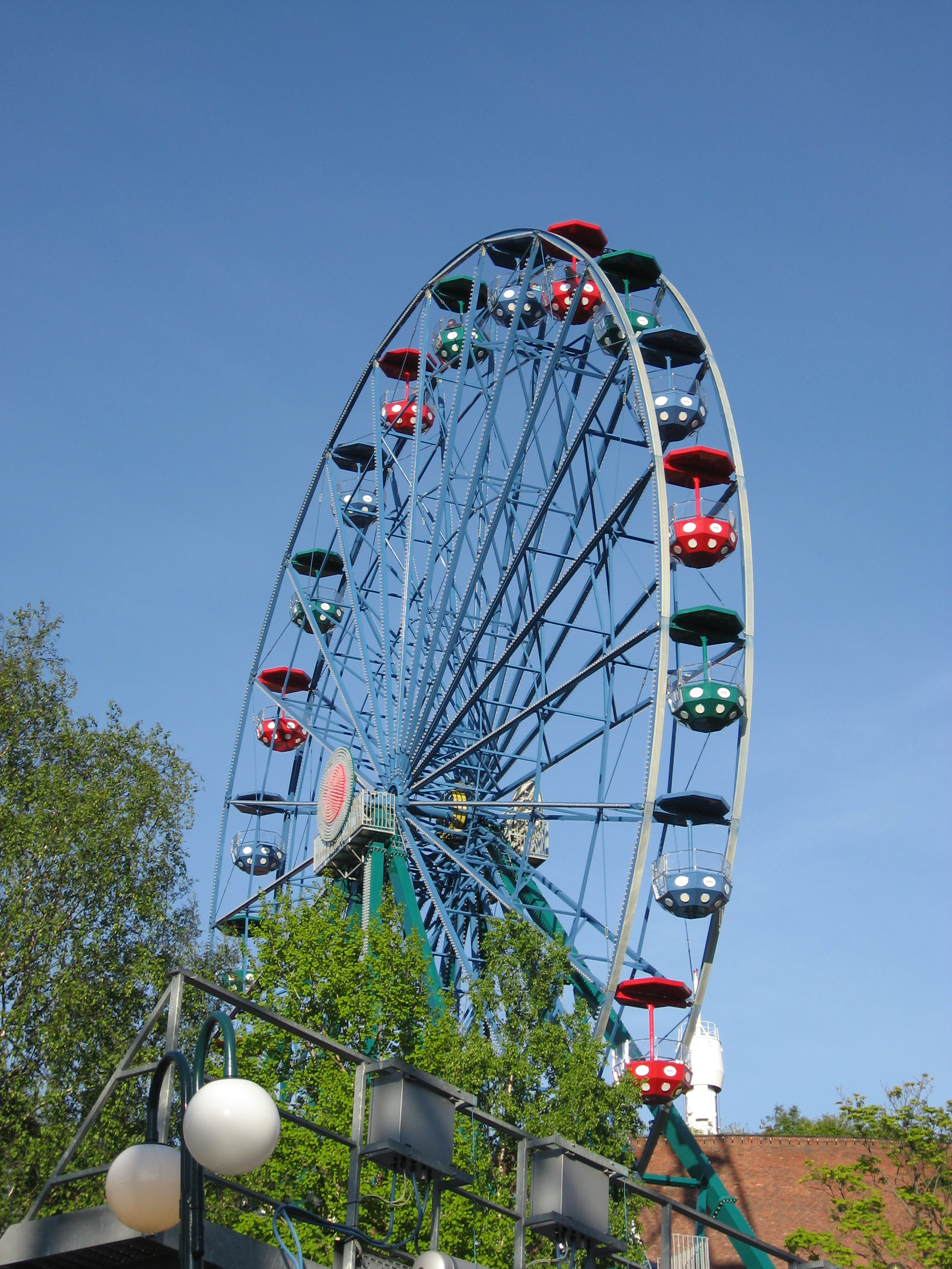 Rinkeli